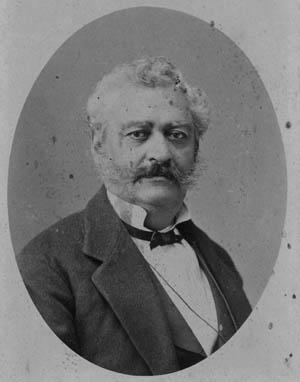 Pablo de la Guerra, Lieutenant Governor